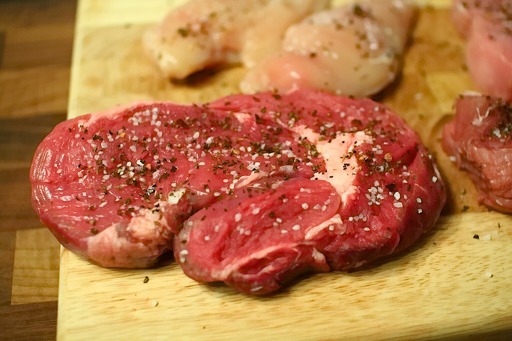 Ein Steak, das vorm Braten mit grobem Salz und grobem schwarzem Pfeffer gewürzt wurde. Camera: Canon EOS REBEL T3i License on Flickr (2012-03-18): CC-BY-2.0 Flickr tags: food, meet, essen, fleisch, gebratenes